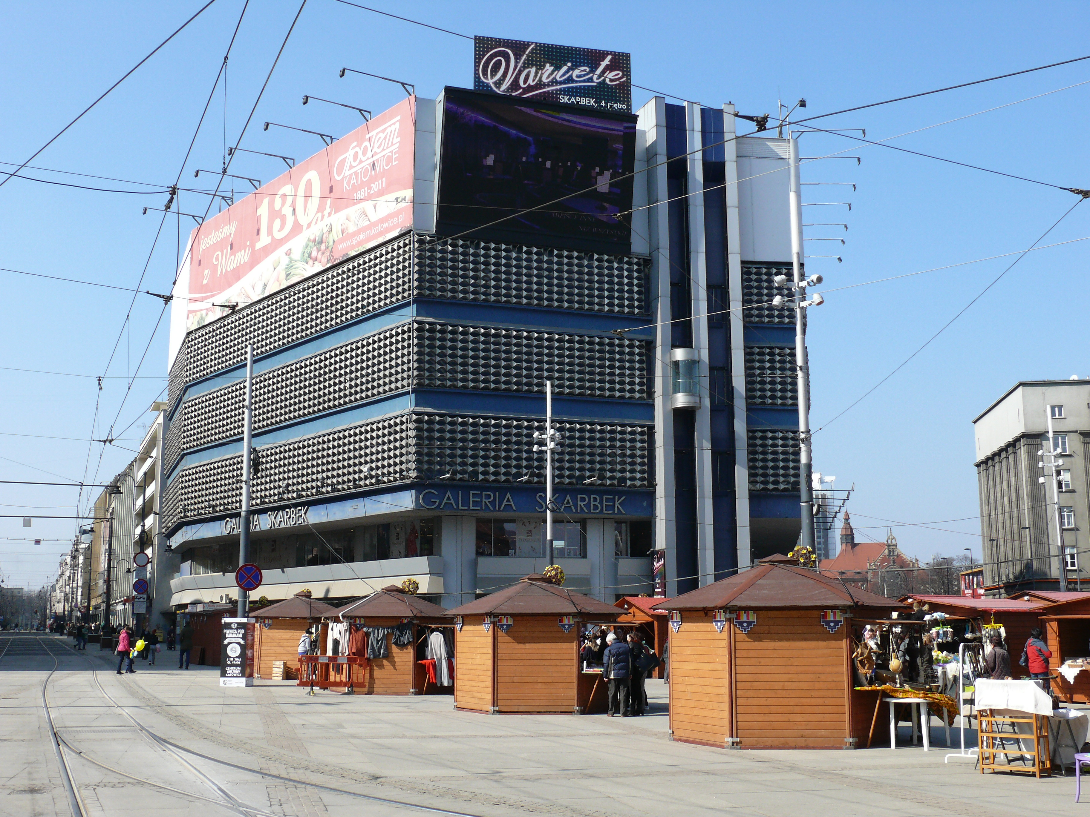 Die Galeria Skarbek auf dem Rynek in Kattowitz.